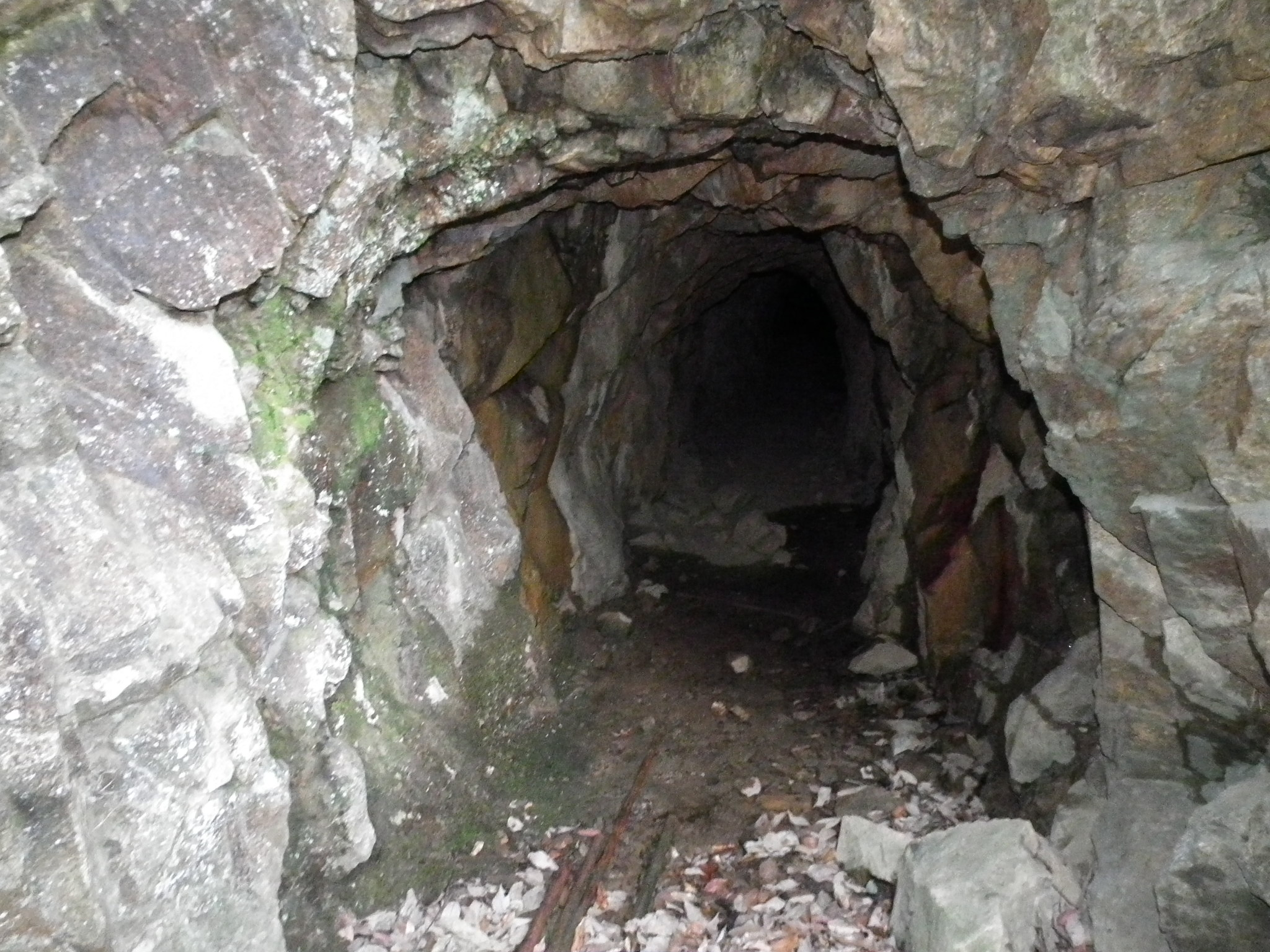 Tunnel of Mt.Taishaku mine 帝釈鉱山坑道跡 神戸市山田町